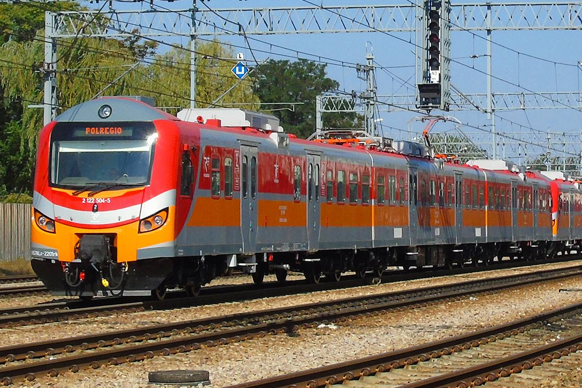 Zmodernizowane elektryczne zespoły trakcyjne EN57ALc-2201, 2202 i 2203 należące do Przewozów Regionalnych przejeżdżają przez stację Grodzisk Mazowiecki jako pociąg służbowy z ZNTK Mińsk Mazowiecki do lokomotywowni Oddziału Wielkopolskiego PR w Lesznie.